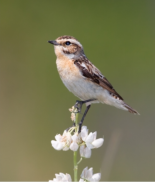 Saxicola rubetra - female, Libavá, CZ